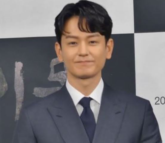 2일 오후 서울시 마포구 상암동 MBC 골든마우스홀에서 MBC 특별기획 ‘이몽’ 제작발표회가 열려 배우 임주환X남규리X이요원X유지태가 포토타임을 갖고 있다.